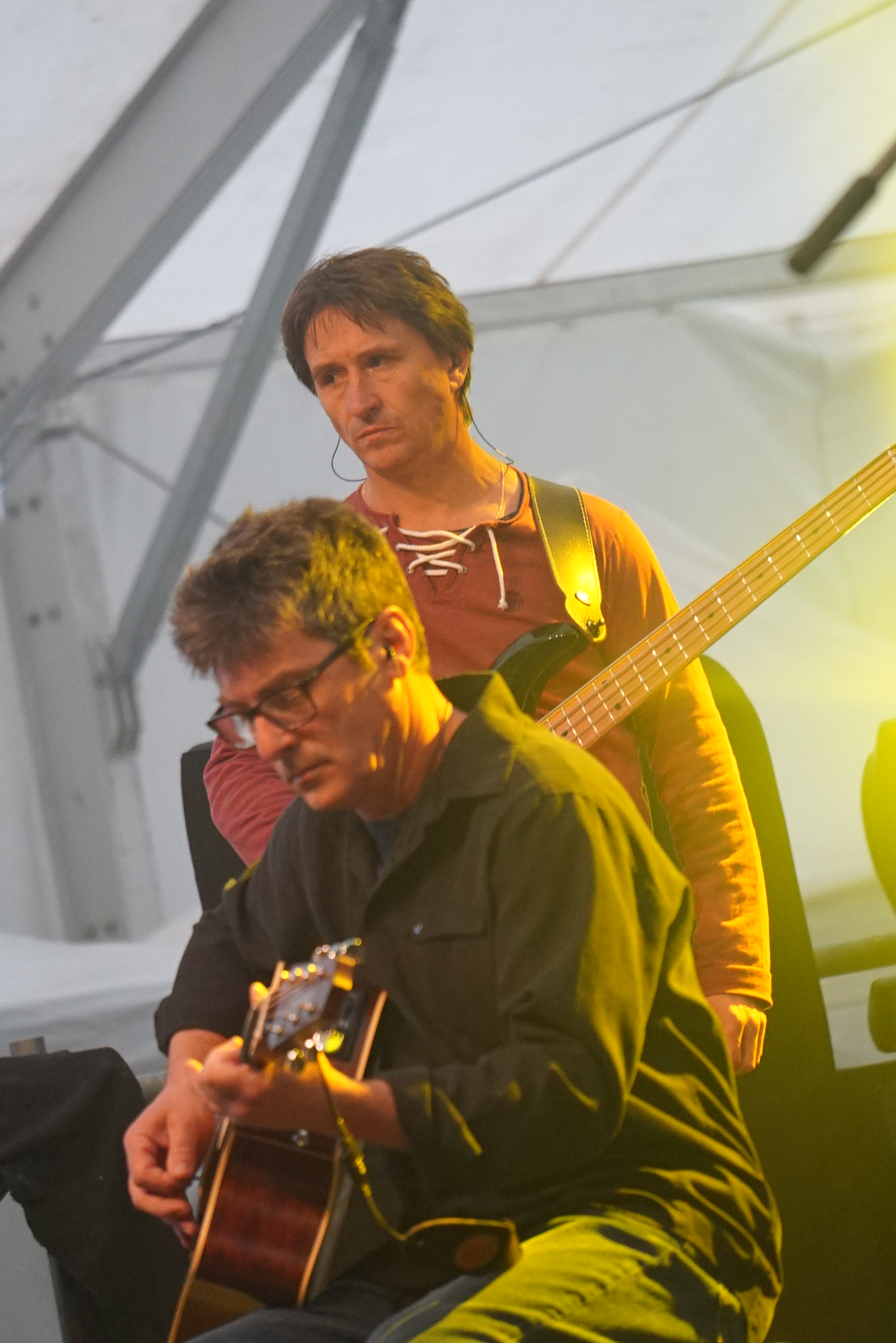 en concert lors du Centenaire de la bataille du Chemin des Dames.